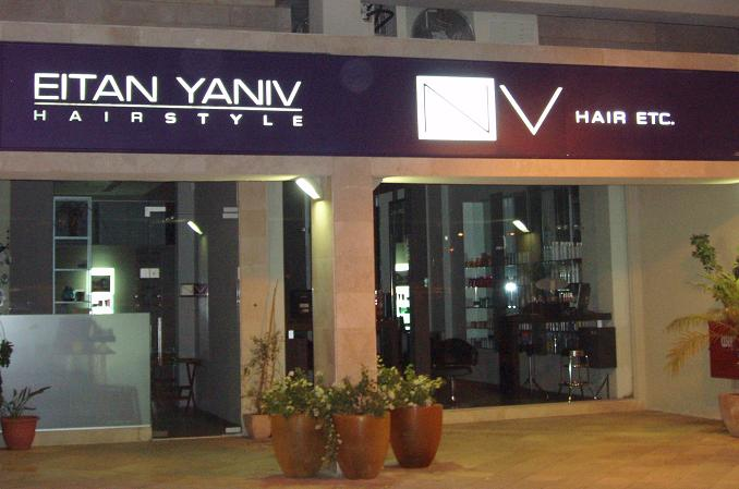 מיתוג זר. צילם דוד שי